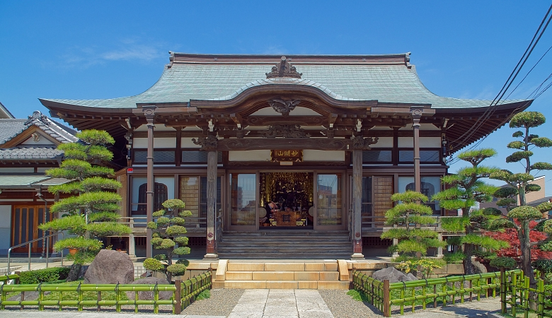 浄瀧寺の本堂外観の写真